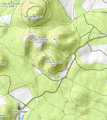 carte réalisée sur umap This map may be incomplete, and may contain errors. Don't rely solely on it for navigation.